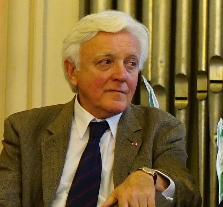 conférence à Reims en l'hôtel de ville.